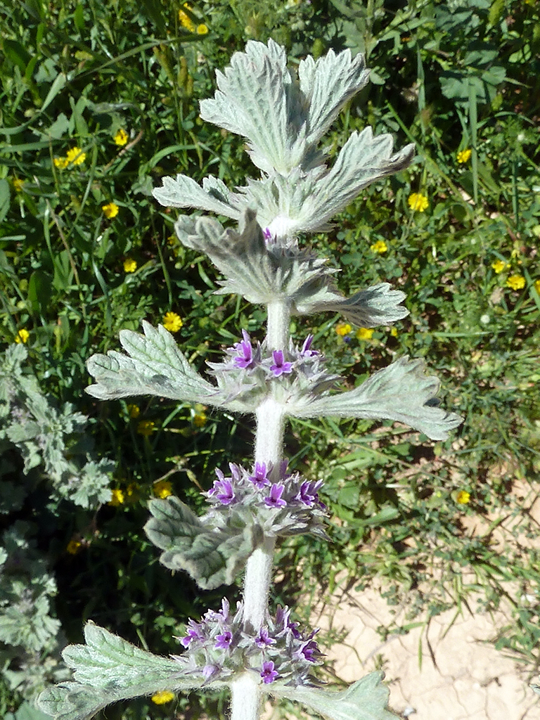 Marrubium alysson (Hierba de la rabia) : Espiga - Colonia Illicitana, Albatera (Alicante, España).